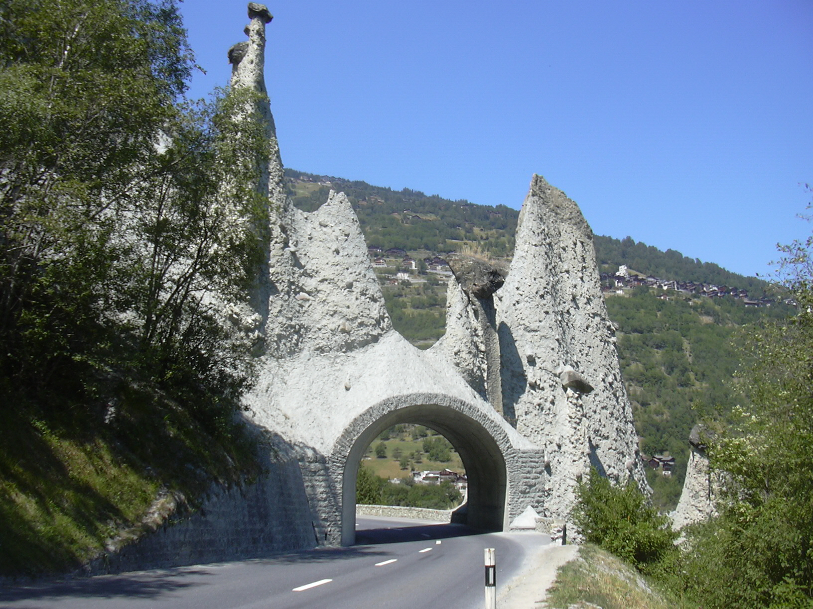 Pyramids of Euseigne, tunnel (1947), Val d'Hérens, Valais/Switzerland